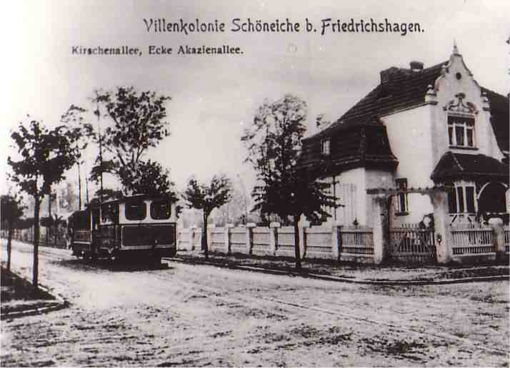 Schöneicher Strassenbahn, 1911 Gemeinfrei